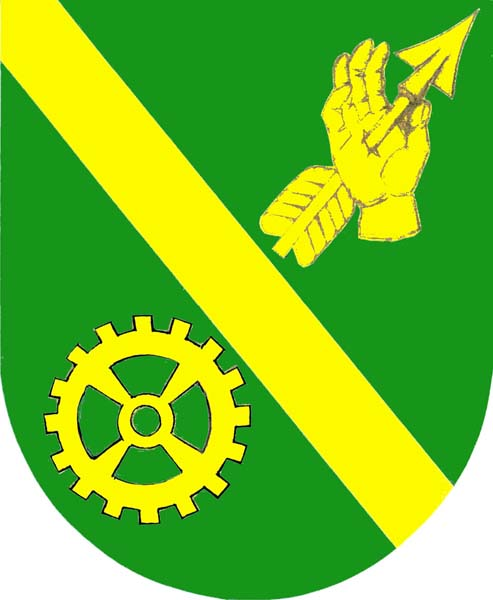 Znak obce Lužec nad Vltavou